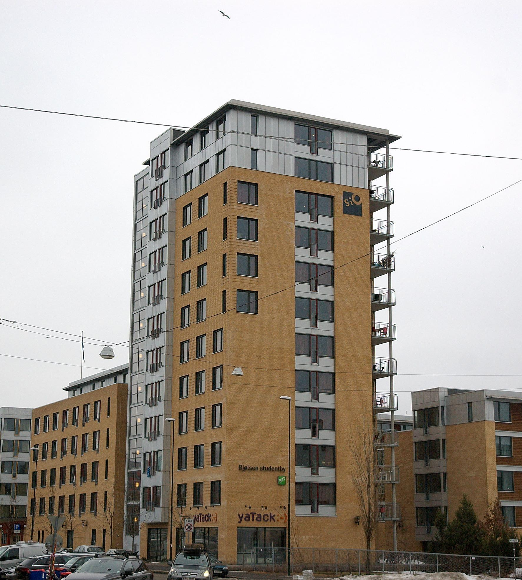 Bjølsen Studentby tegnet av arkitektkontoret Telje-Torp-Aasen